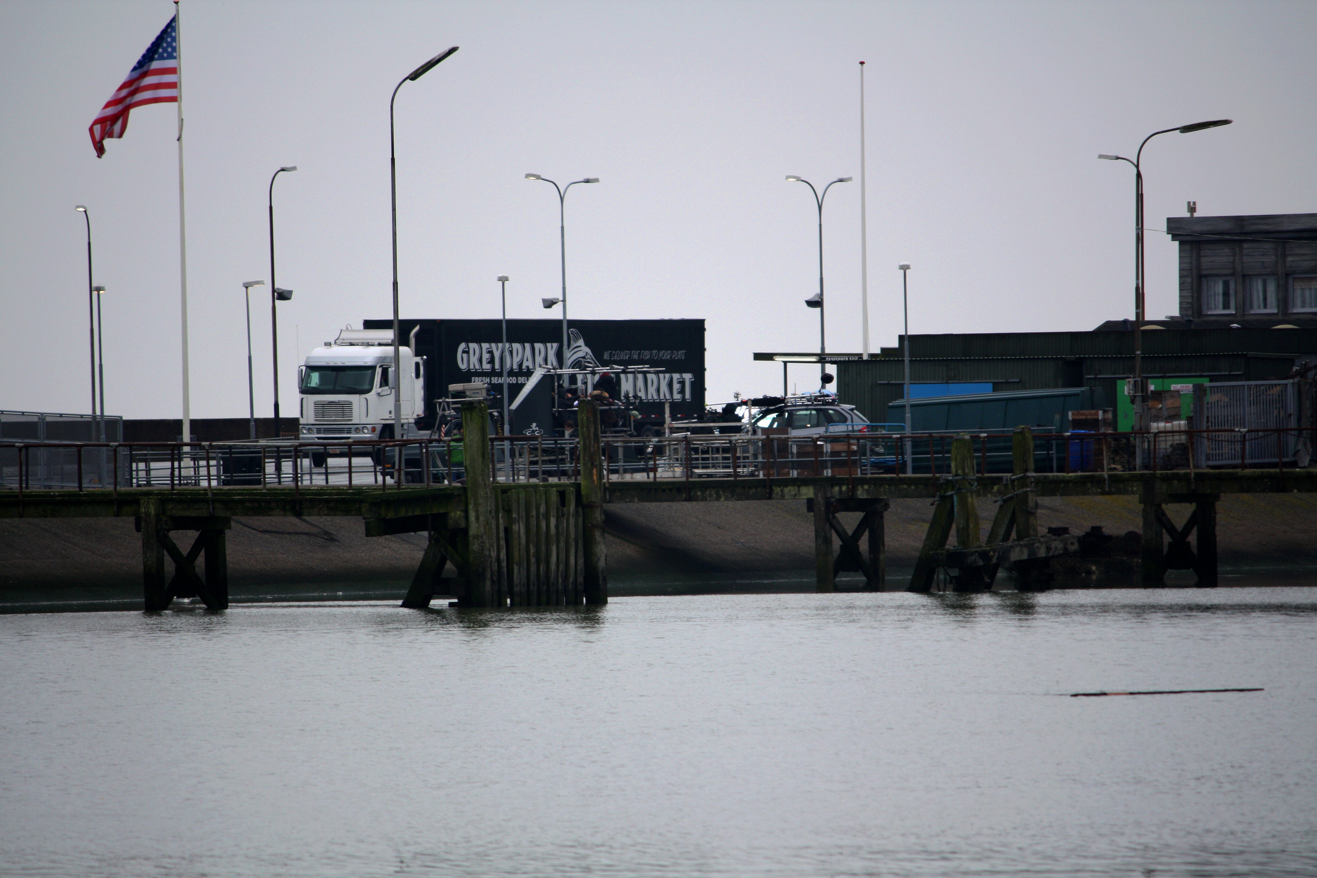 SETPHOTO: Das Bild zeigt eine Szene aus Roman Polanskis Kinofilm "The Ghostwriter". Der dänische Hafen Havneby der Nordseeinsel Römö wurde zu einer US-amerikanischen Hafenstadt umfunktioniert. Ewan McGregor versteckt sich auf der Flucht vor Auftragskillern hinter dem schwarzen Truck, um als letzter auf die Fähre zu gelangen. In der Bildmitte ist der silberfarbene BMW-Geländewagen zu sehen, mit dem der Schauspieler seine Fluchtfahrt unternimmt. Das Fahrzeug ist mit diversem Kamera- und Montangeequipment ausstaffiert. Rechts ist das Motel zu sehen, in dem McGregor absteigen wird, nachdem ihm die Flucht von der Fähre geglückt ist.